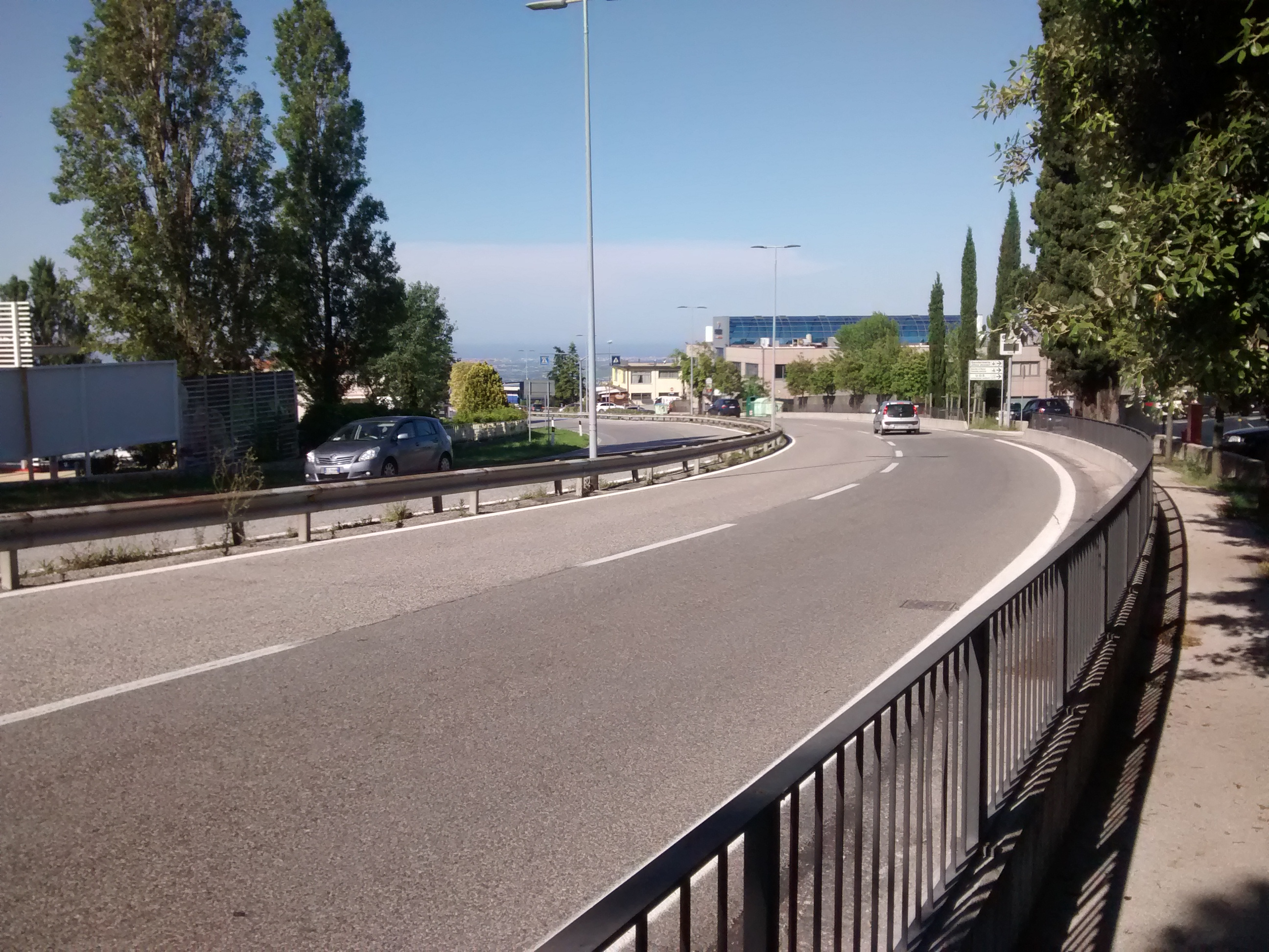 San Marino Highway